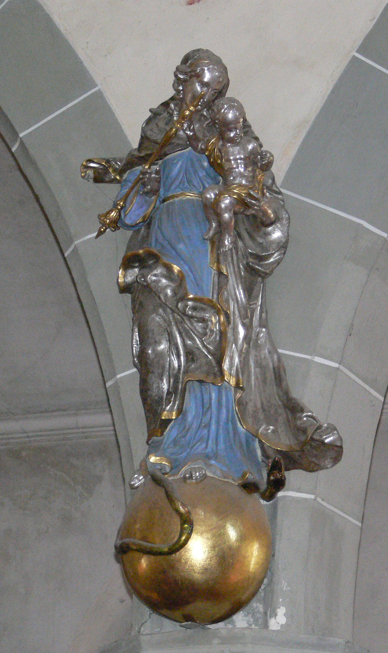 Pfarrkirche St. Georg, Bermatingen, Bodenseekreis: Figur "Maria vom Siege", Joseph Anton Feuchtmayer oder Ehrgott Bernhard Bendl zugeschrieben Joseph Anton Feuchtmayer (1696–1770) Alternative names Joseph Feichtmayr; Joseph Anton Feichtmayr; Joseph Anton Feichtmayer; Joseph Anton Faichtmair; Joseph Feuchtmayer; Joseph Feuchtmair; josef anton feuchtmayerDescriptionGerman sculptorDate of birth/death 1696 2 January 1770Location of birth/death Linz Mimmenhausen bei Salem (Baden)Work location OberschwabenAuthority control : Q323434 VIAF: 69721226 ISNI: 0000 0000 6678 5681 ULAN: 500032217 LCCN: n84189350 WGA: FEUCHTMAYR, Joseph Anton WorldCat creator QS:P170,Q323434 Ehrgott Bernhard Bendl (1660–1738) Alternative names Ehregott Bernhard Bendl; Ehrgott Bernhard Bendel; Ehrgott Bernhard Pendel; Ehrgott Bernhard PendlDescriptionGerman sculptorDate of birth/death circa 1660 date QS:P,+1660-00-00T00:00:00Z/9,P1480,Q5727902 31 January 1738Location of birth/death Pfarrkirchen AugsburgWork location Paris; Rome; Augsburg; Prague; ViennaAuthority control : Q1300779 VIAF: 47555695 ISNI: 0000 0000 2139 8004 GND: 118655361 RKD: 114679 creator QS:P170,Q1300779